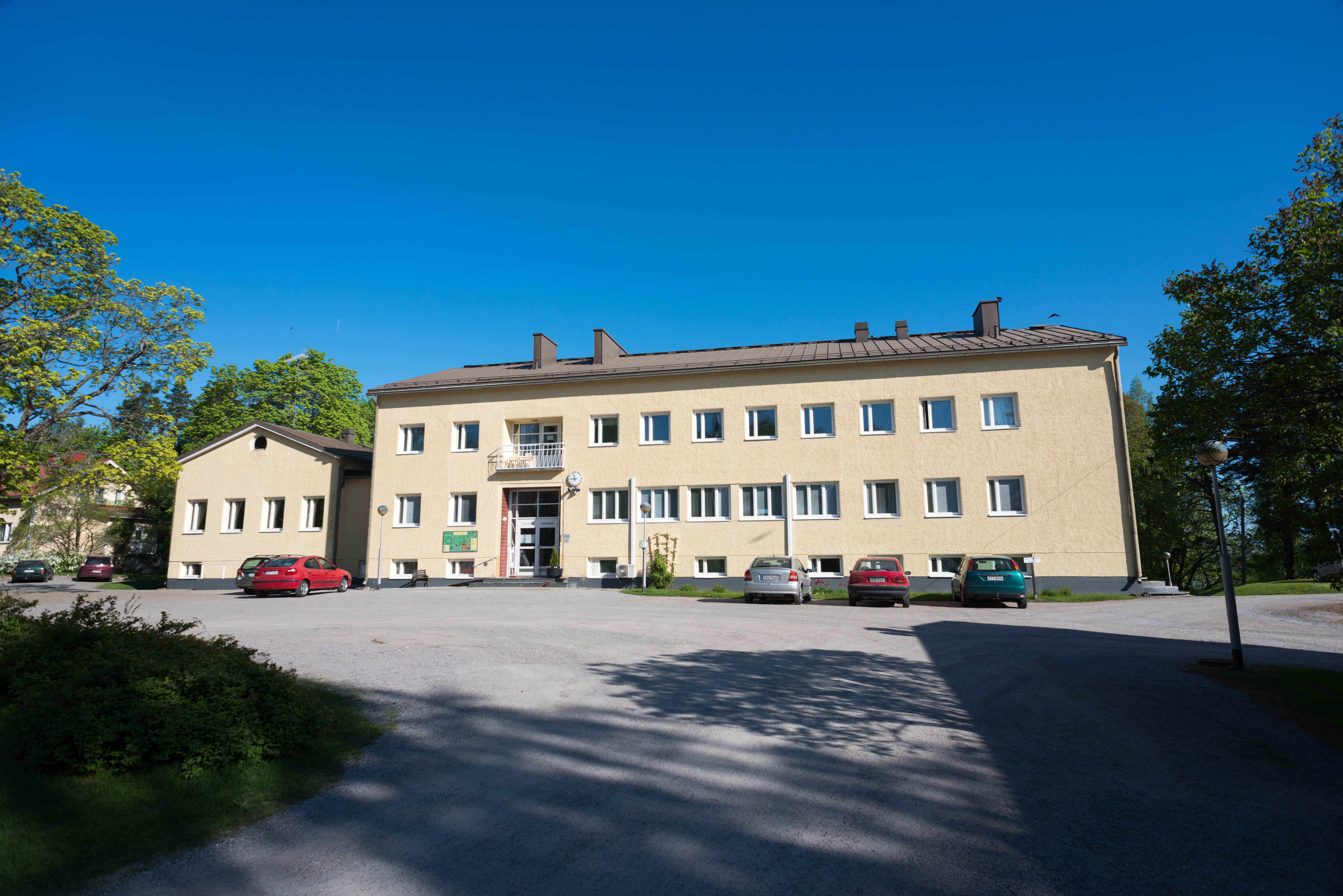 Muurlan opisto Muurlassa